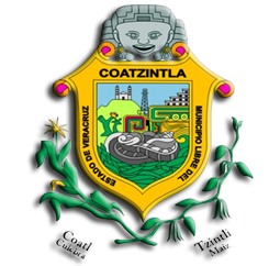 El escudo de la ciudad de Coatzintla, Veracruz